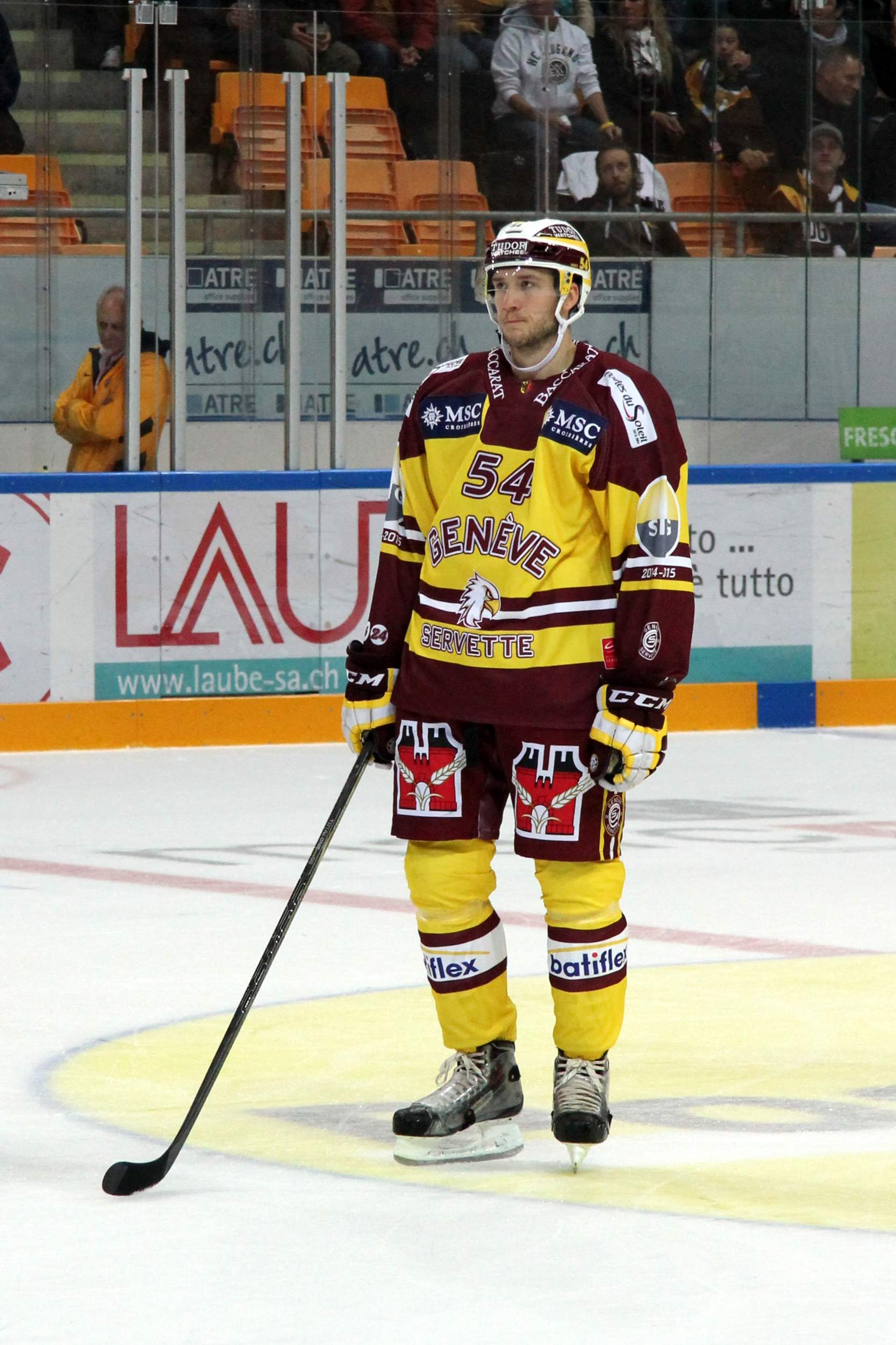 Christian Marti (G 54).